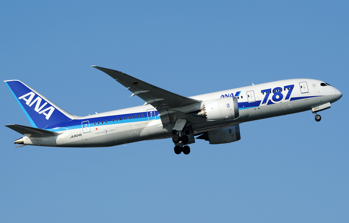 ANA Boeing 787-881